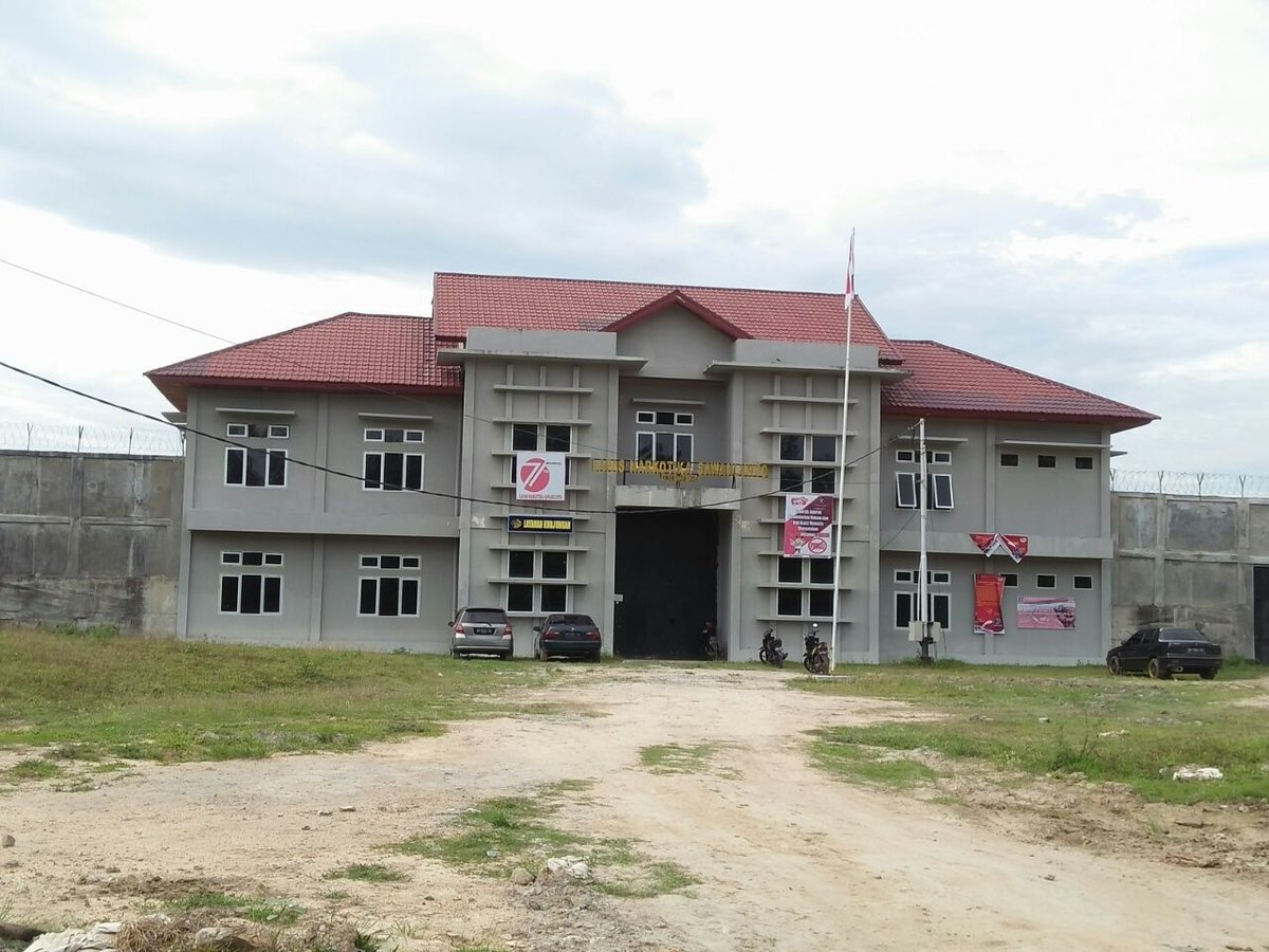 Lembaga Pemasyarakatan (Lapas) Narkotika Sawahlunto di Kawasan Wisata Kandih, Kecamatan Talawi, Kota Sawahlunto. Gambar diambil pada Januari 2017.